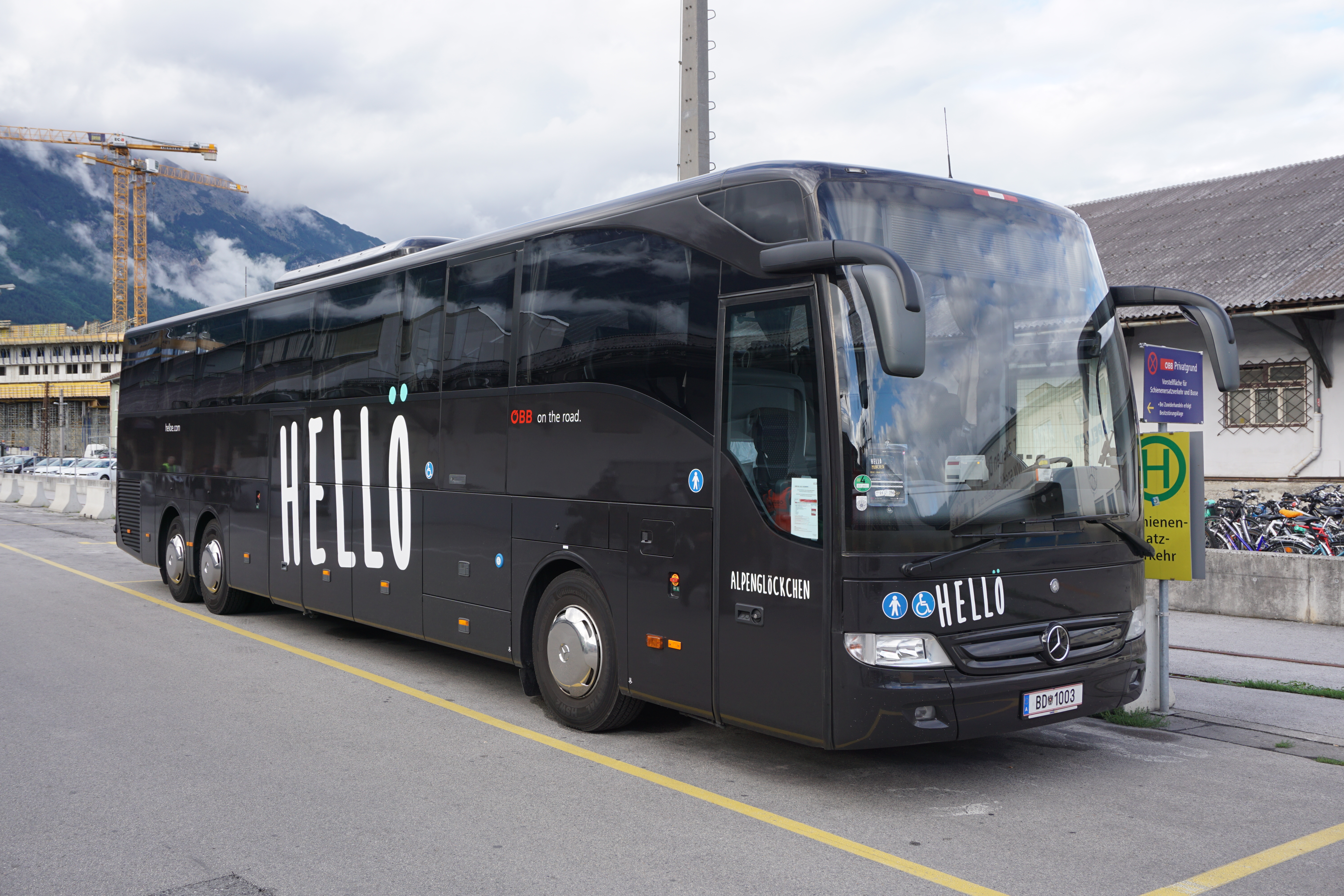 Mercedes-Benz Tourismo 17 RHD der Fernbus-Marke HELLÖ an der Verladestelle Innsbruck Hauptbahnhof